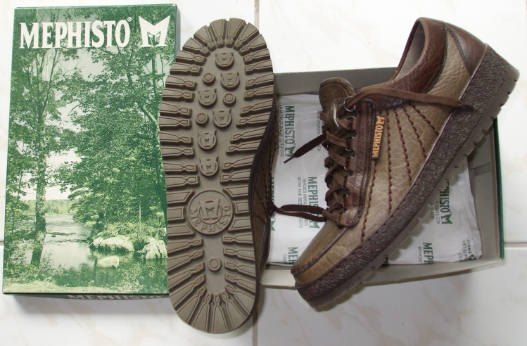 Mephistoschuhe /SchuhProfil/ mit Karton